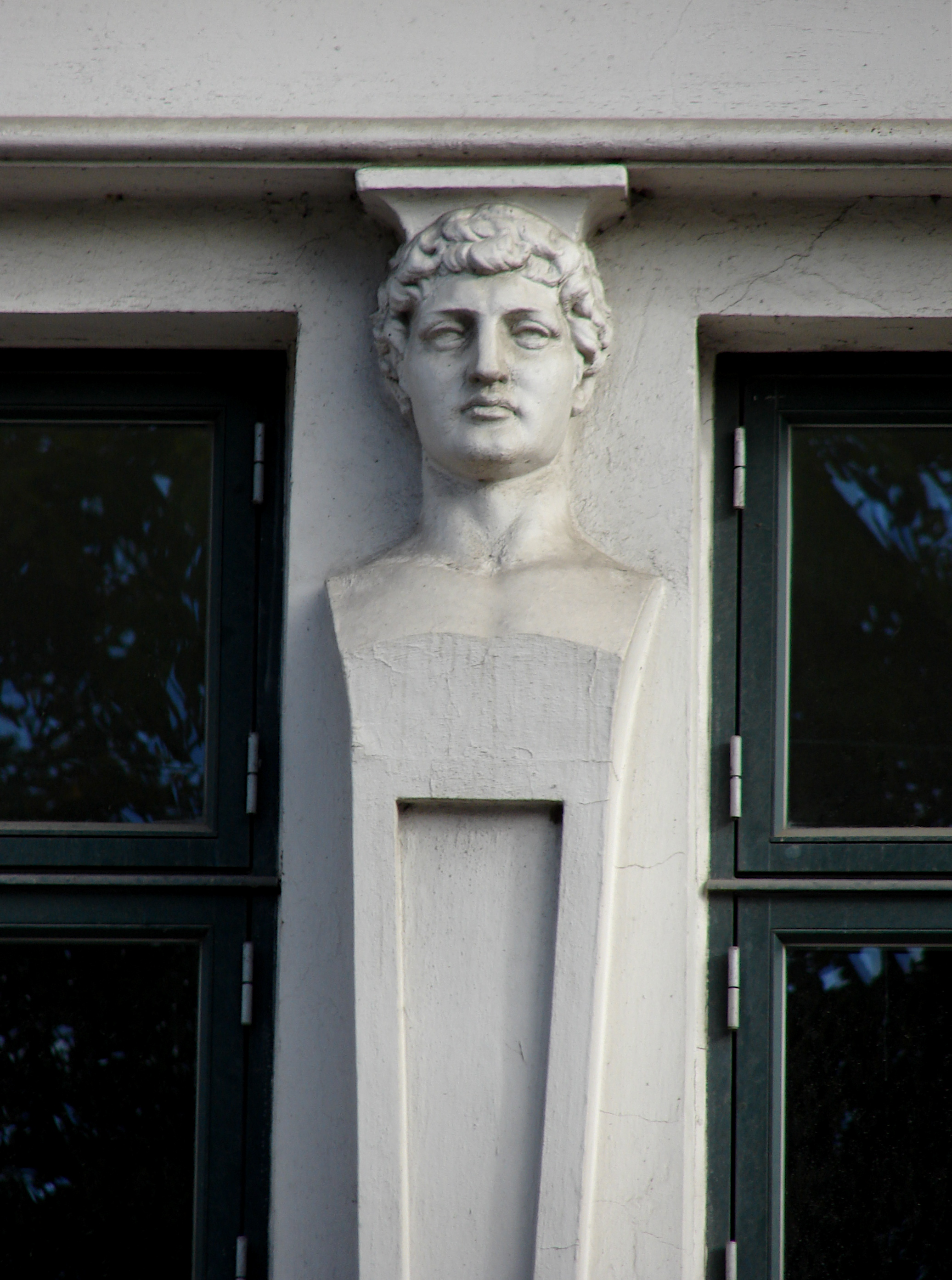 Atlante fra bygning på Nørre Søgade, København